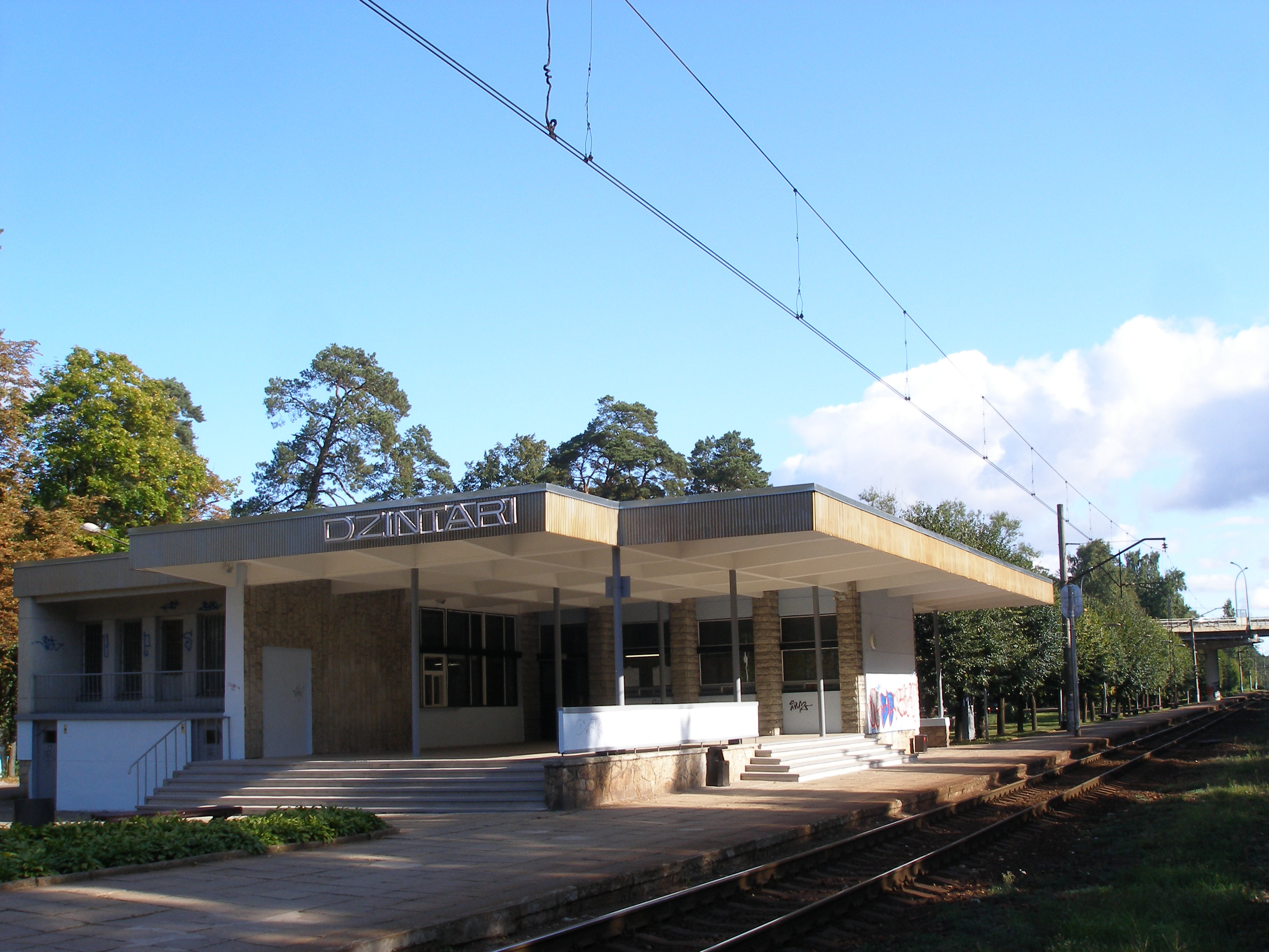 Dzintaru stacijas ēka.